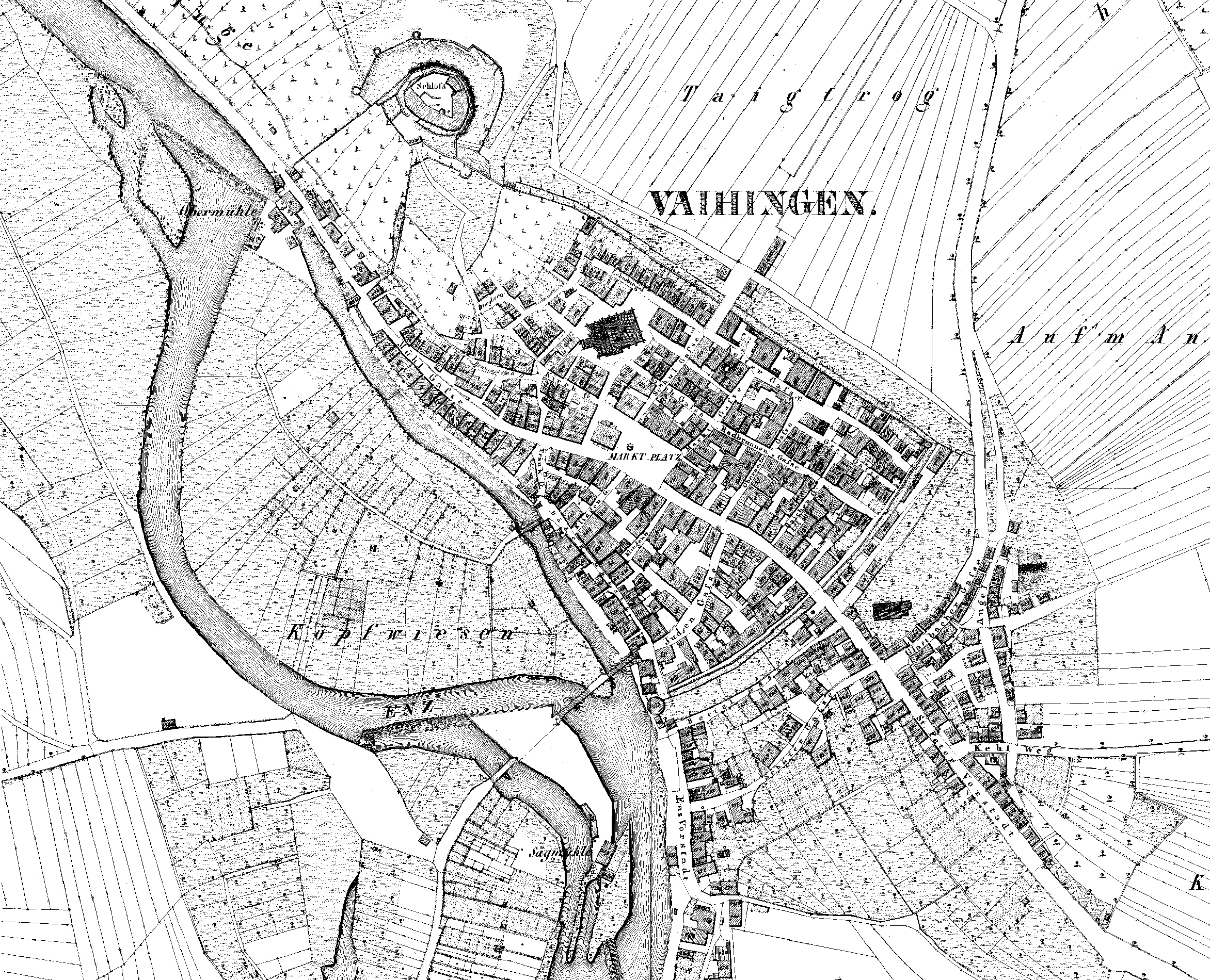 Vaihingen an der Enz um 1832 mit Schloss Kaltenstein und Peterskirchen-Vorstadt (Flurkarten-Composit)